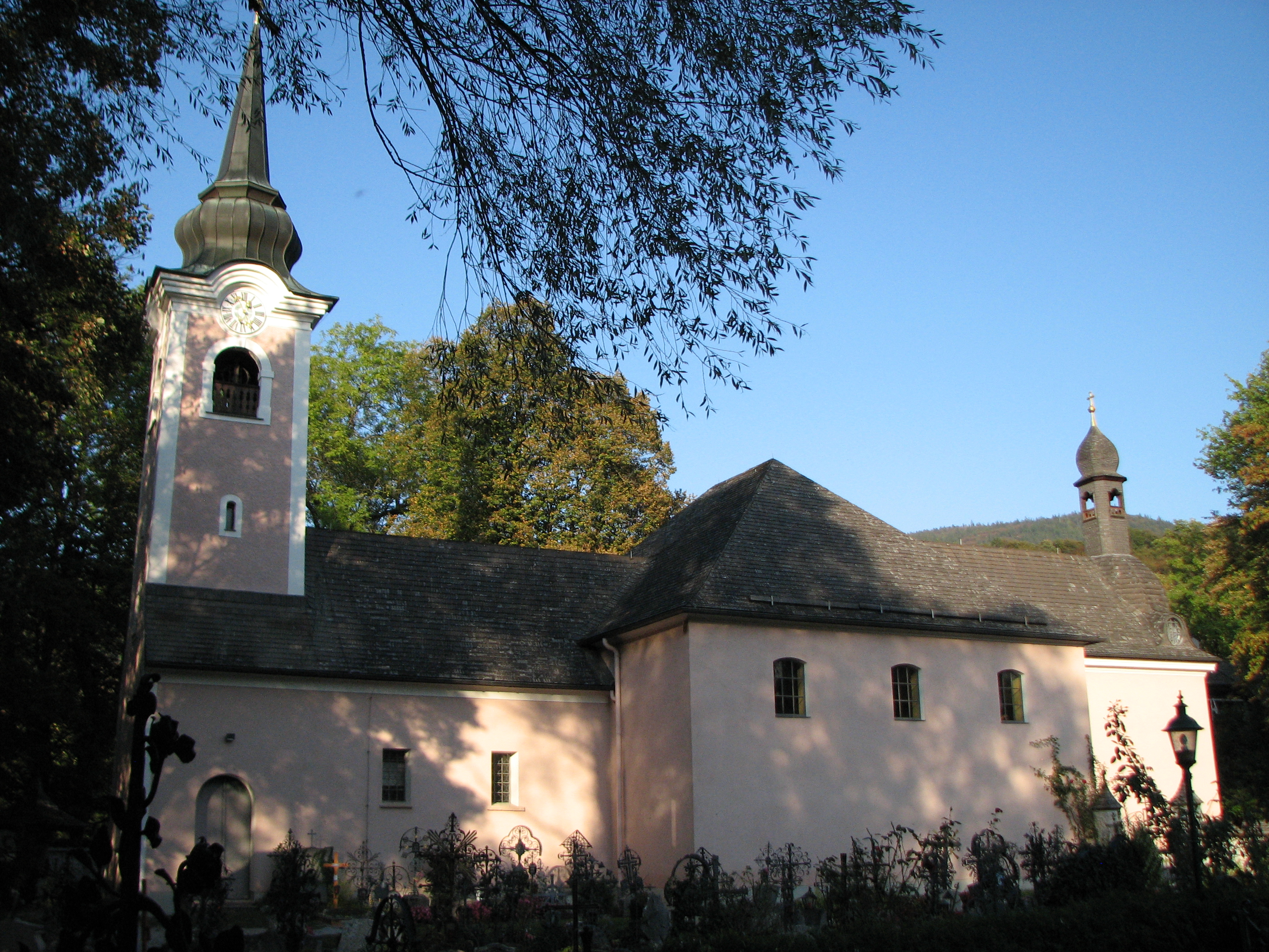 Wallfahrtskirche hl. Jakob der Ältere